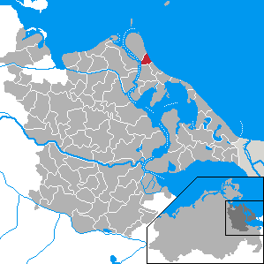 Karlshagen, Landkreis Ostvorpommern, Mecklenburg-Vorpommern